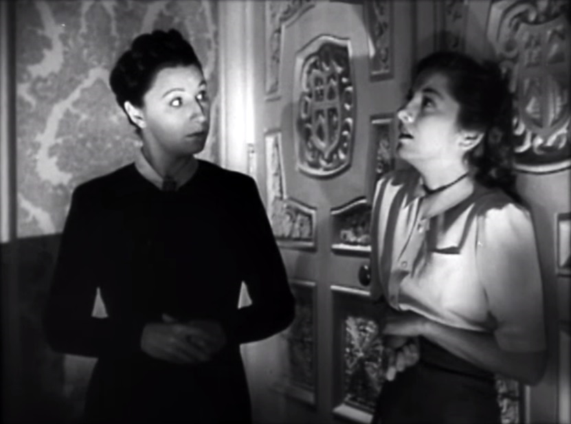 Las actrices Judith Anderson y Joan Fontaine en una secuencia de la película Rebeca.